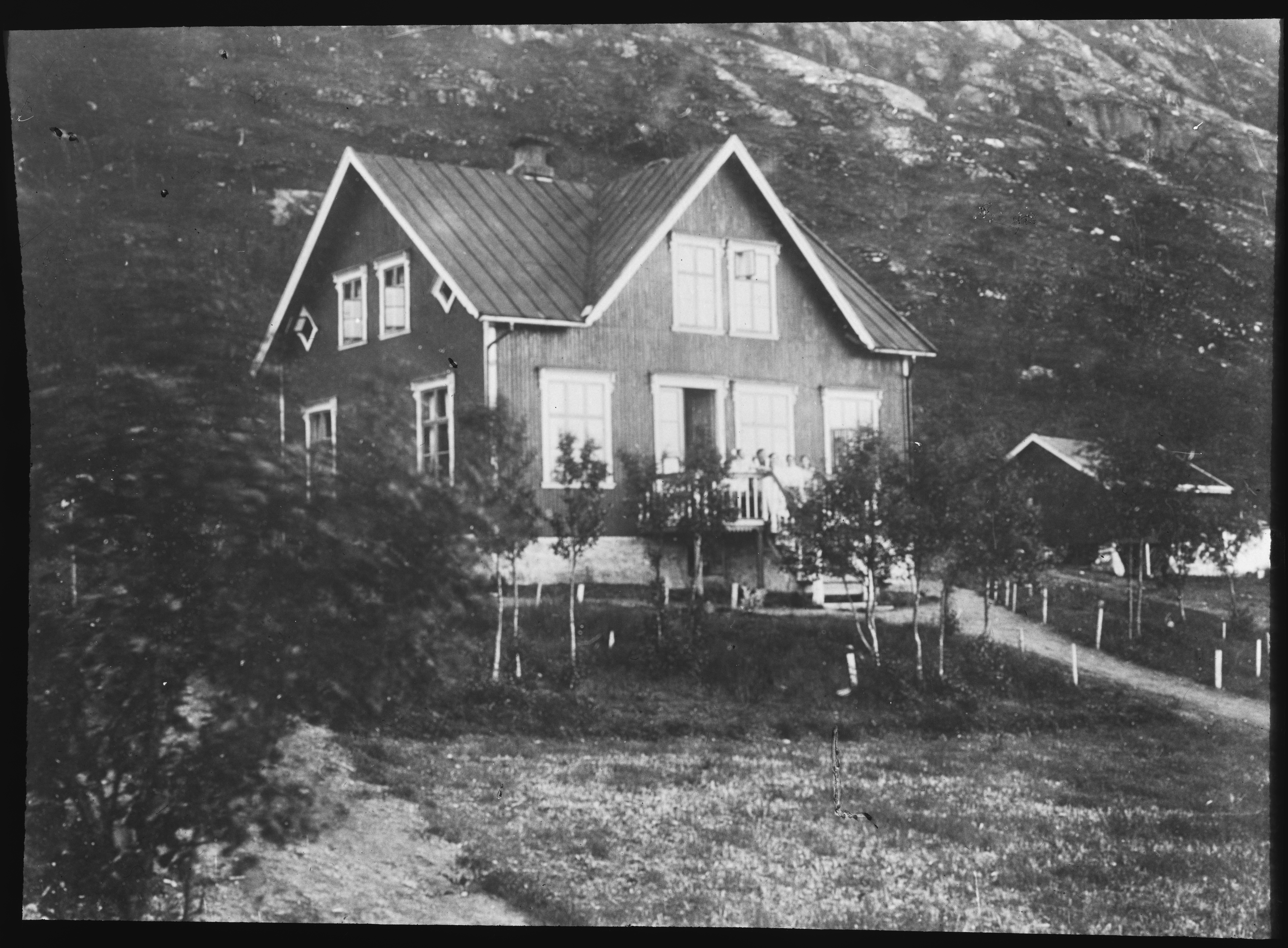 Bildet er hentet fra Arkivverket. Bildet er en del av en lysbildeserie fra Fredly i Tysfjord, hvor foreningen Kvinnelige Misjonsarbeidere var engasjert i arbeid rettet mot den samiske befolkningen. Bodil Biørn, norsk misjonær, hjelpearbeider, sykepleier og jordmor, har antakelig tatt flesteparten av bildene og brukt dem i lysbildeforedrag. Arkivinstitusjon : Riksarkivet Arkivnavn : Kvinnelige Misjonsarbeidere Sted : Norge, Nordland, Tysfjord, Tysfjord Emneord: Hjelpearbeid, Misjon, Samisk Avbildet